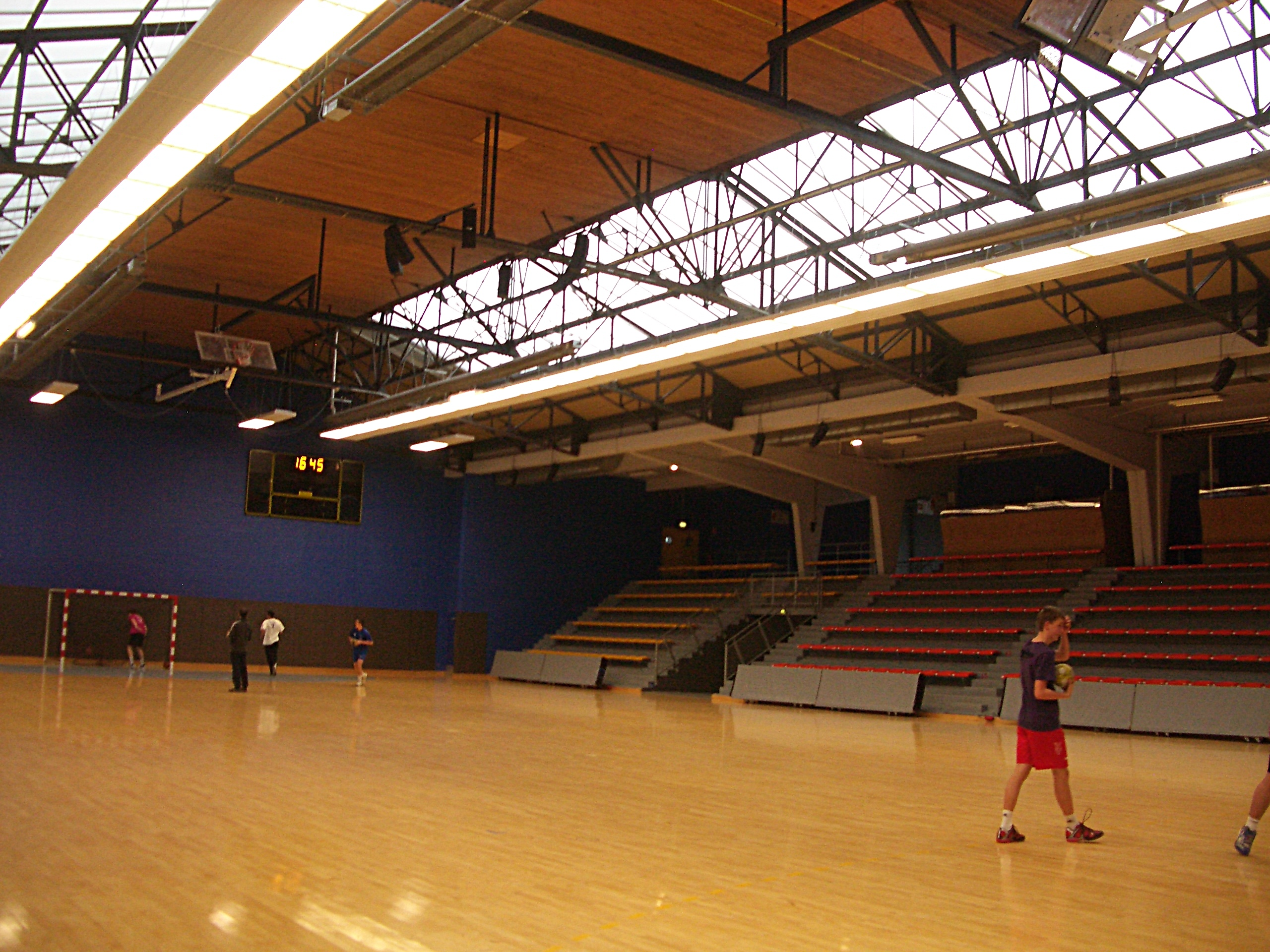 Stade du Grevarin à Vernon (eure)